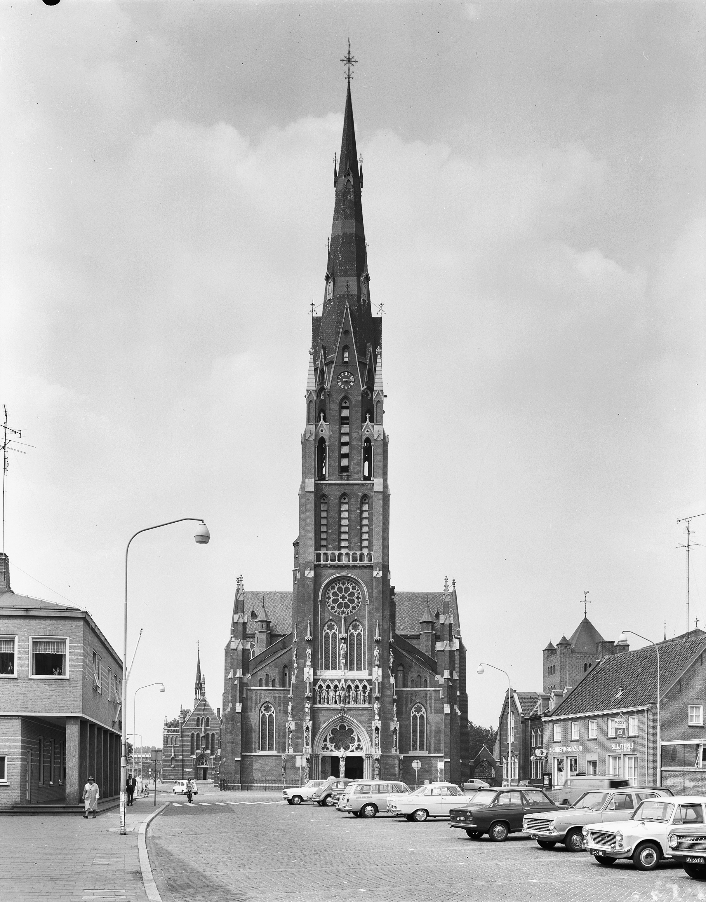 Rooms-Katholieke Kerk: west-zijde toren